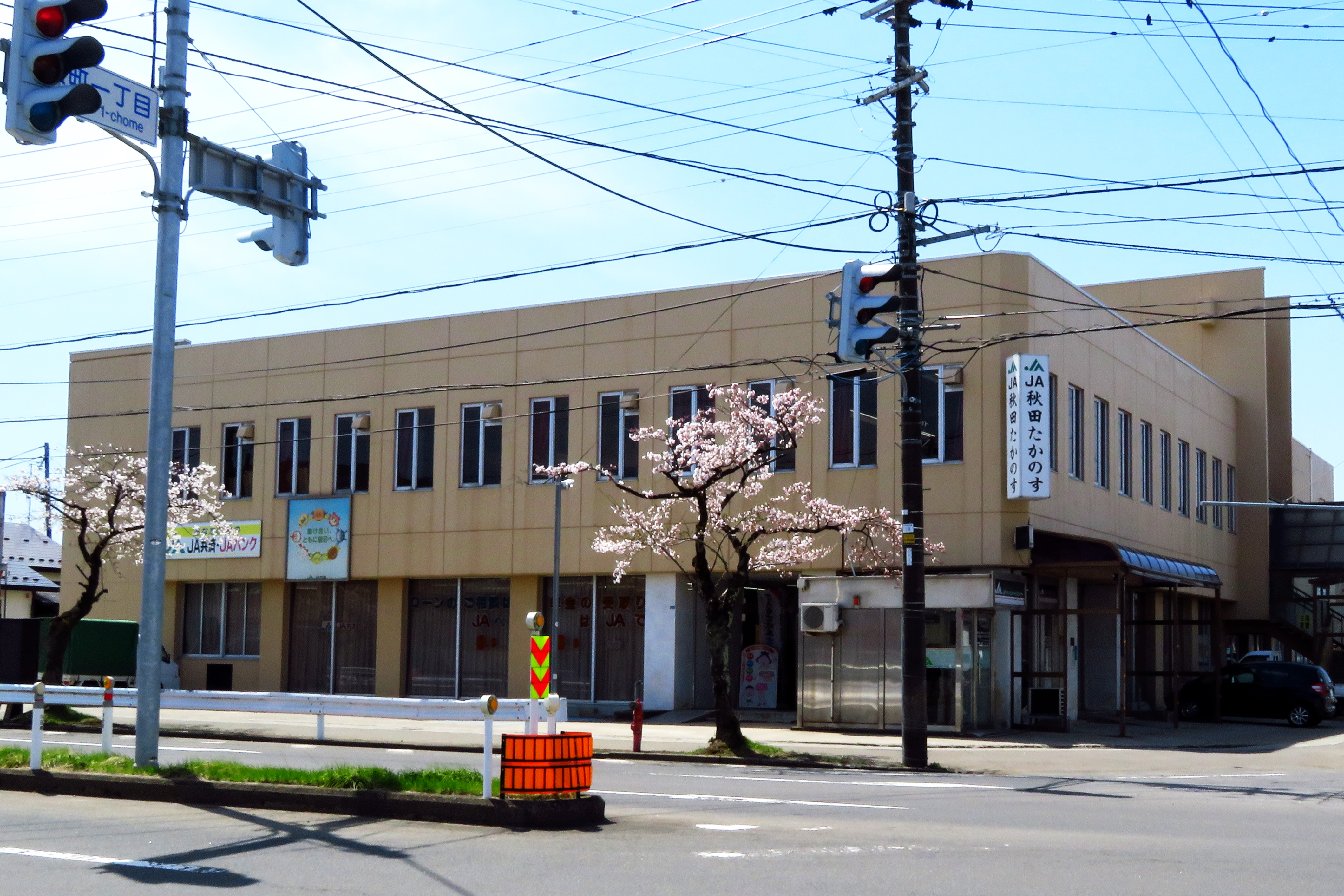 秋田たかのす農業協同組合 本店：秋田県北秋田市 Canon PowerShot SX720 HS